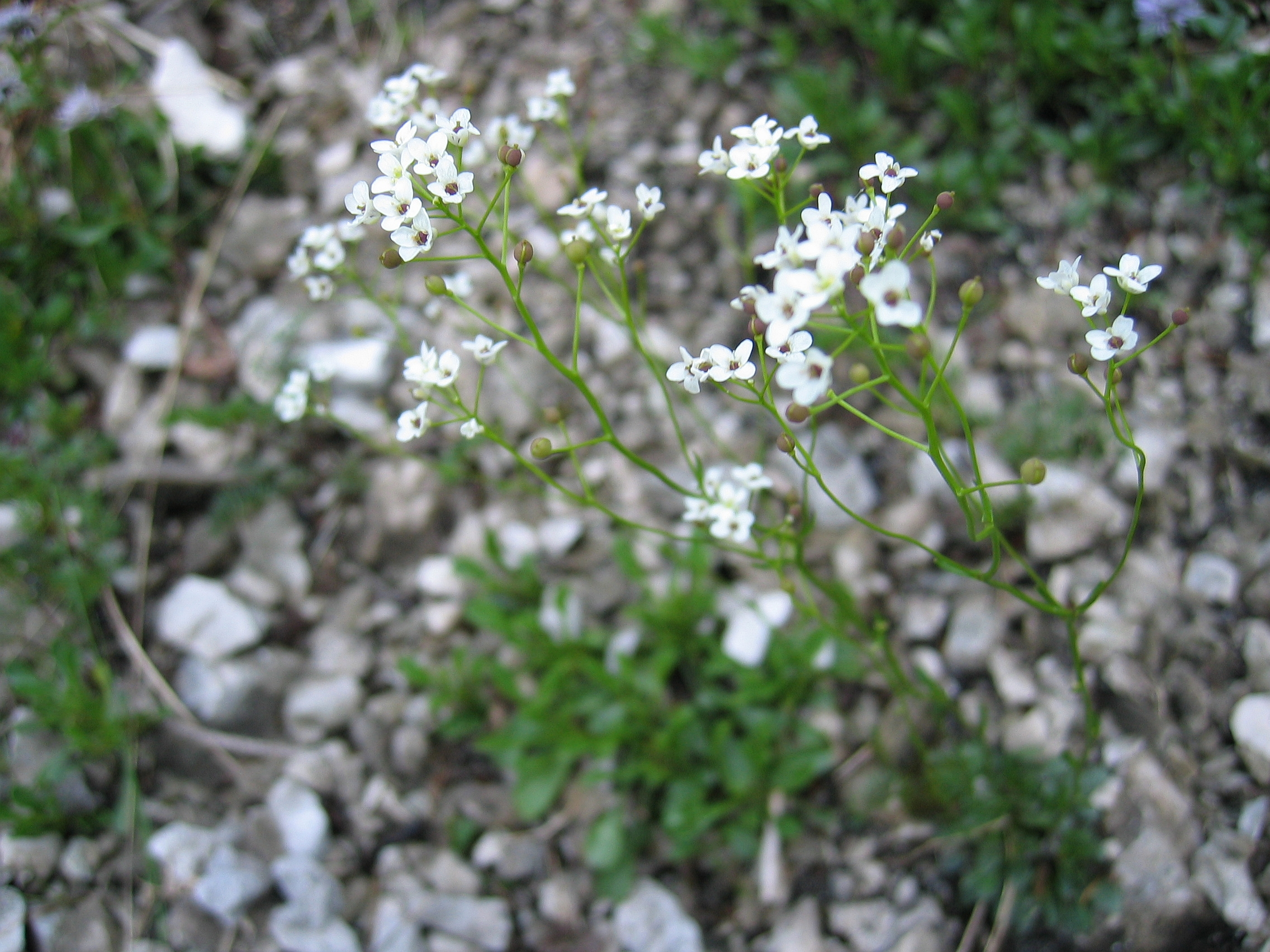 Kernera saxatilis', Sengsengebirge, Upper Austria, Austria